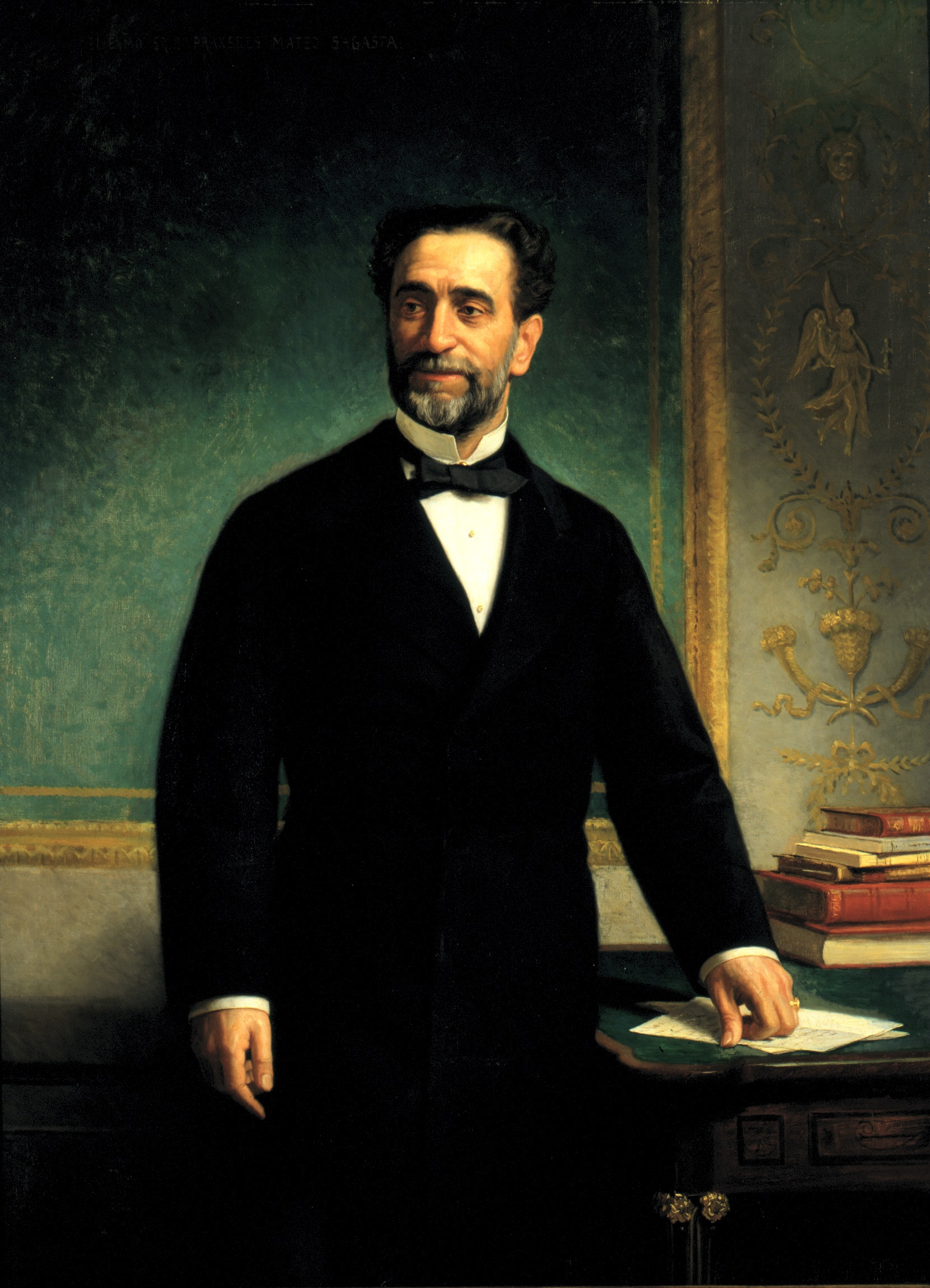 Retrato del politico español Práxedes Mateo Sagasta (1825-1903).